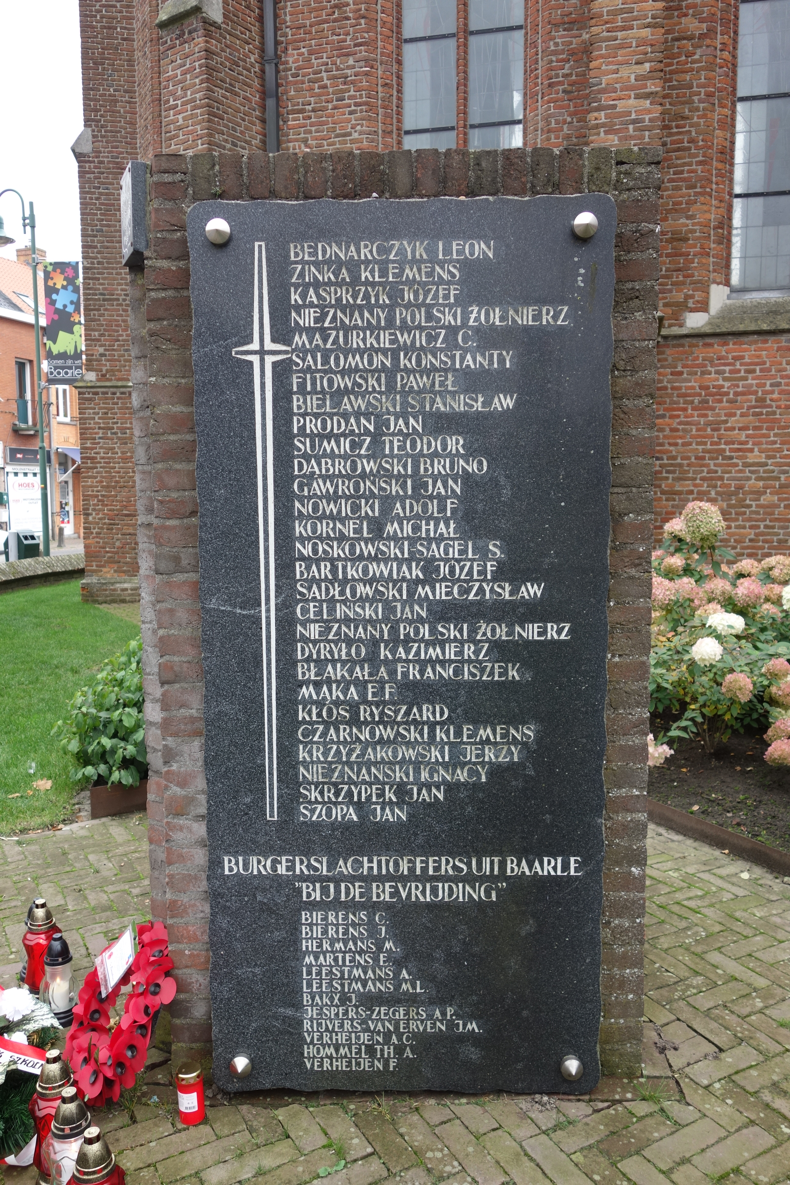 Plaquette met omgekomen Poolse bevrijders van Baarle-Hertog, met onderaan omgekomen bewoners.